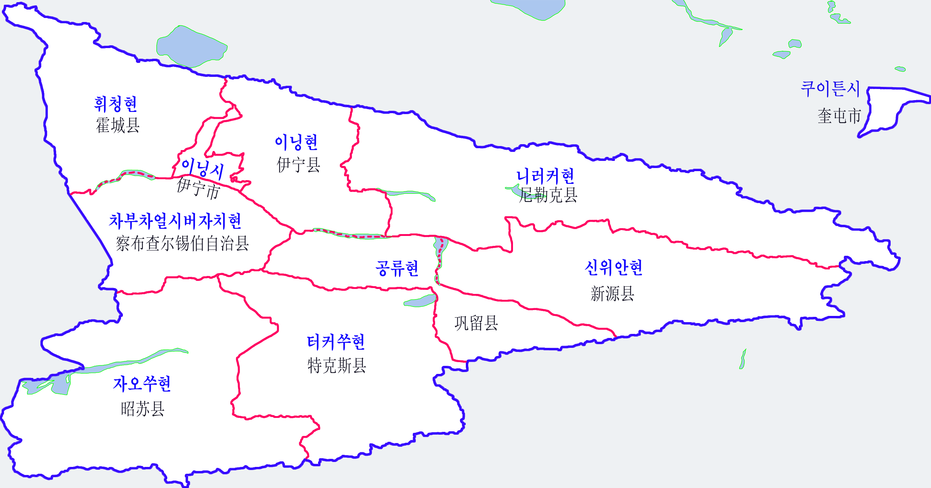 이리카자자치주 직할 현급지도